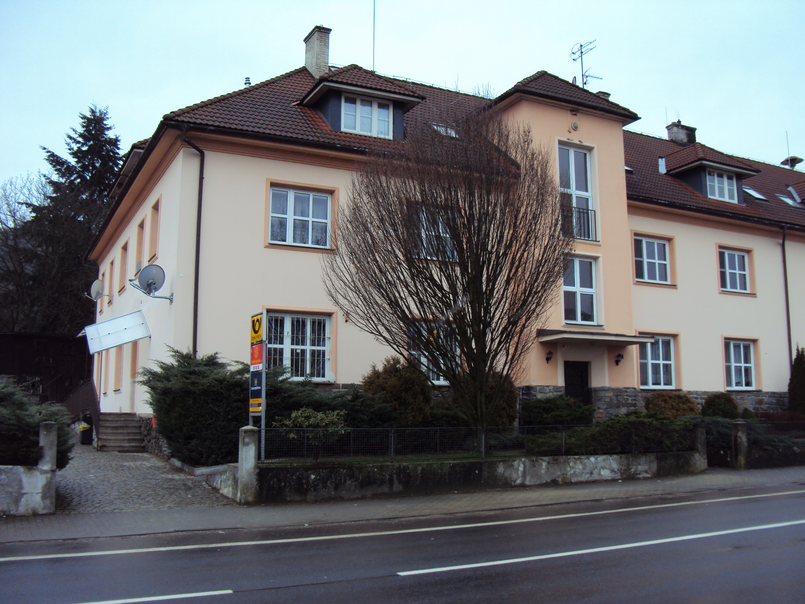 Olšany obecní úřad